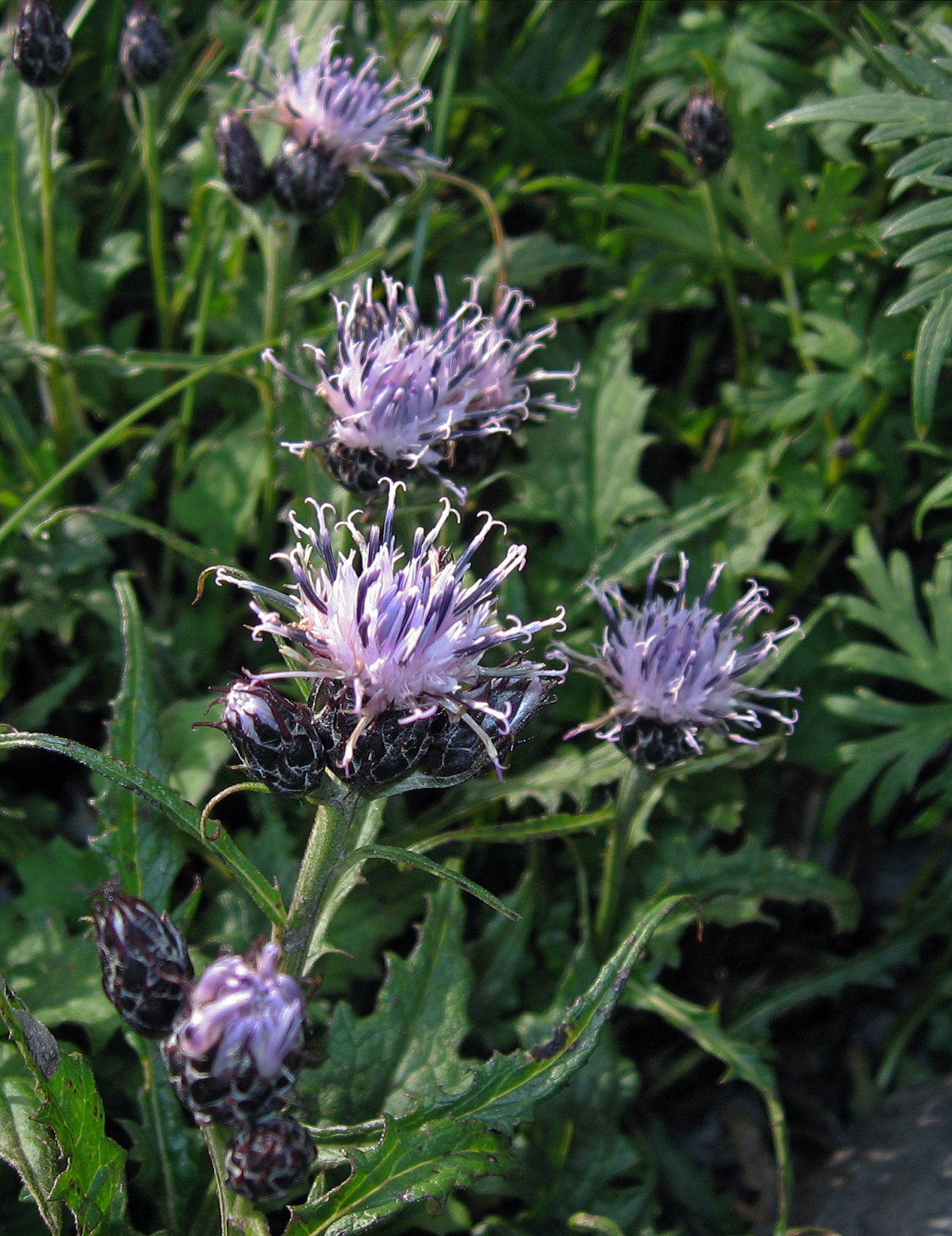 タカネヒゴタイ (学名：Saussurea triptera var. minor)